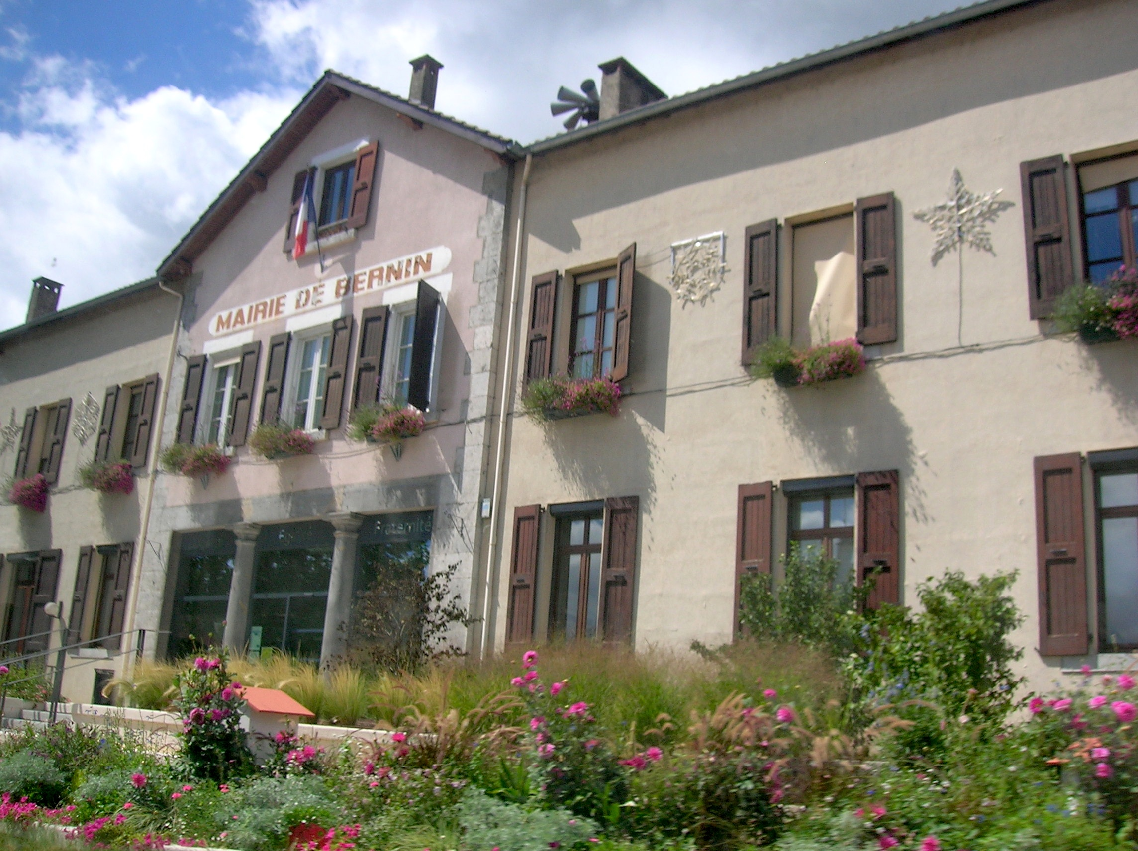 mairie de Bernin, Isère, AuRA, France.